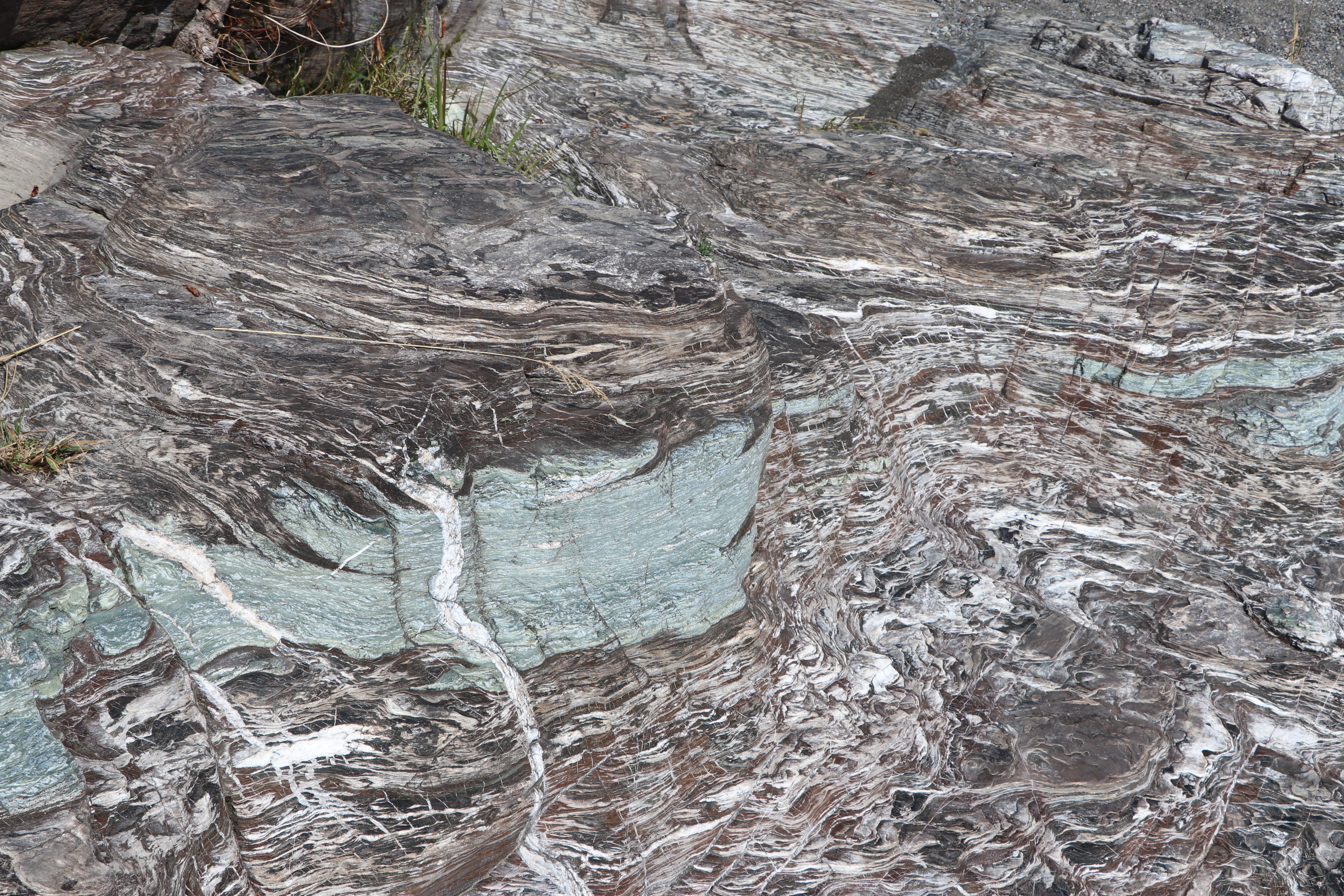 「虎岩」と呼ばれる結晶片岩の接写。埼玉県長瀞町に所在。